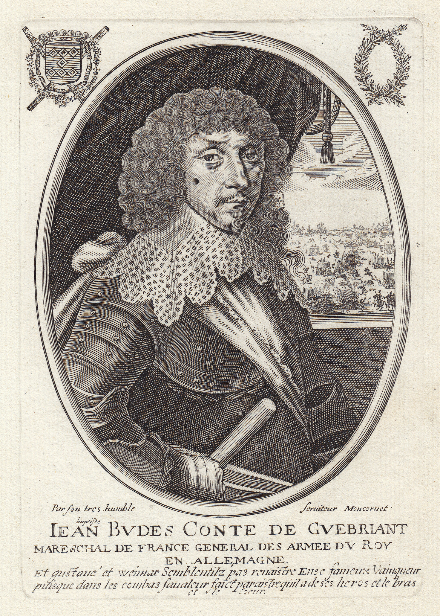 Kupferstich mit dem Porträt von Jean Baptiste Budes de Guébriant, Marschall von Frankreich; Plattengröße 16,5 x 11,5 cm